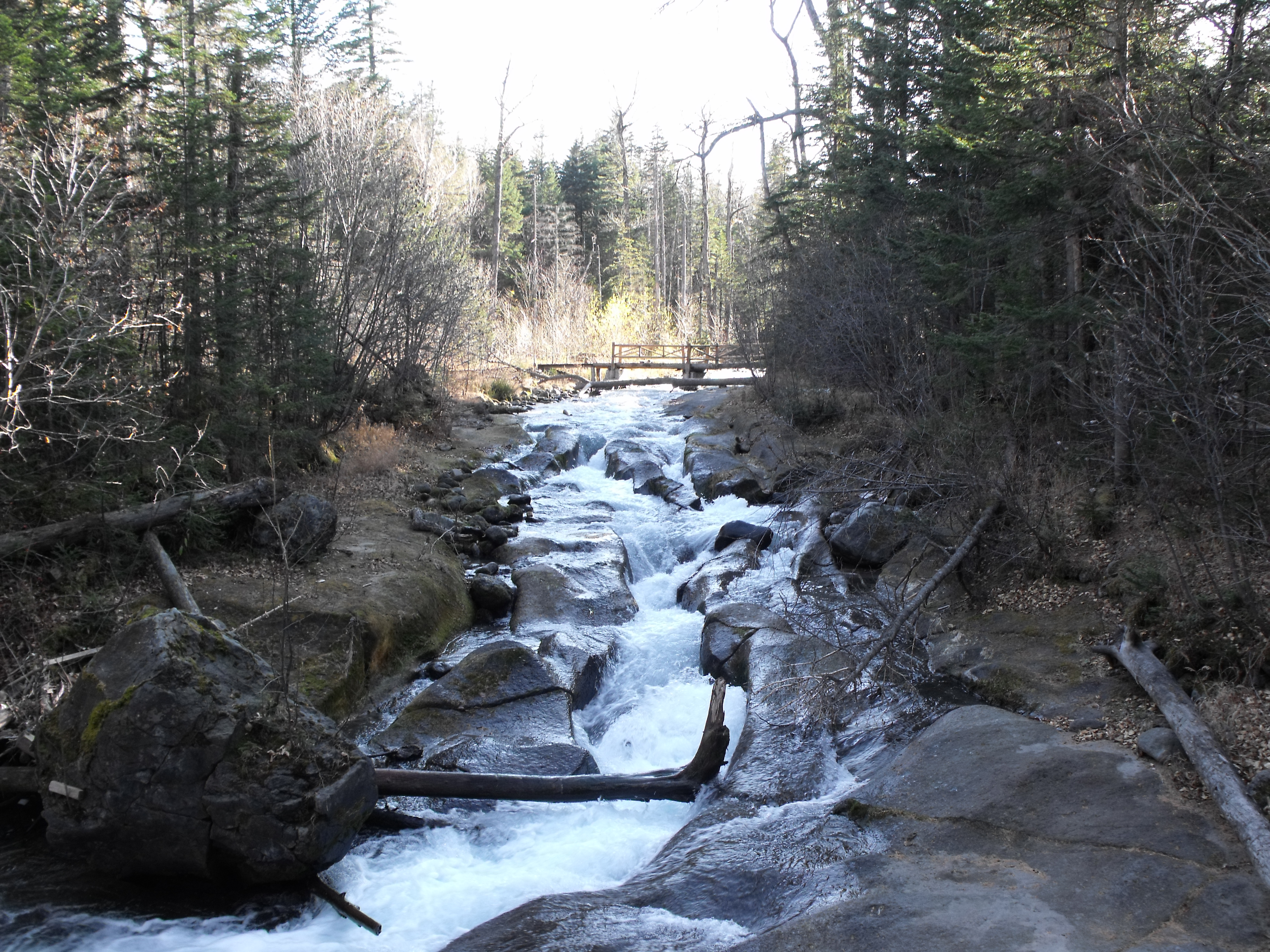 长白上瀑布形成的河流。